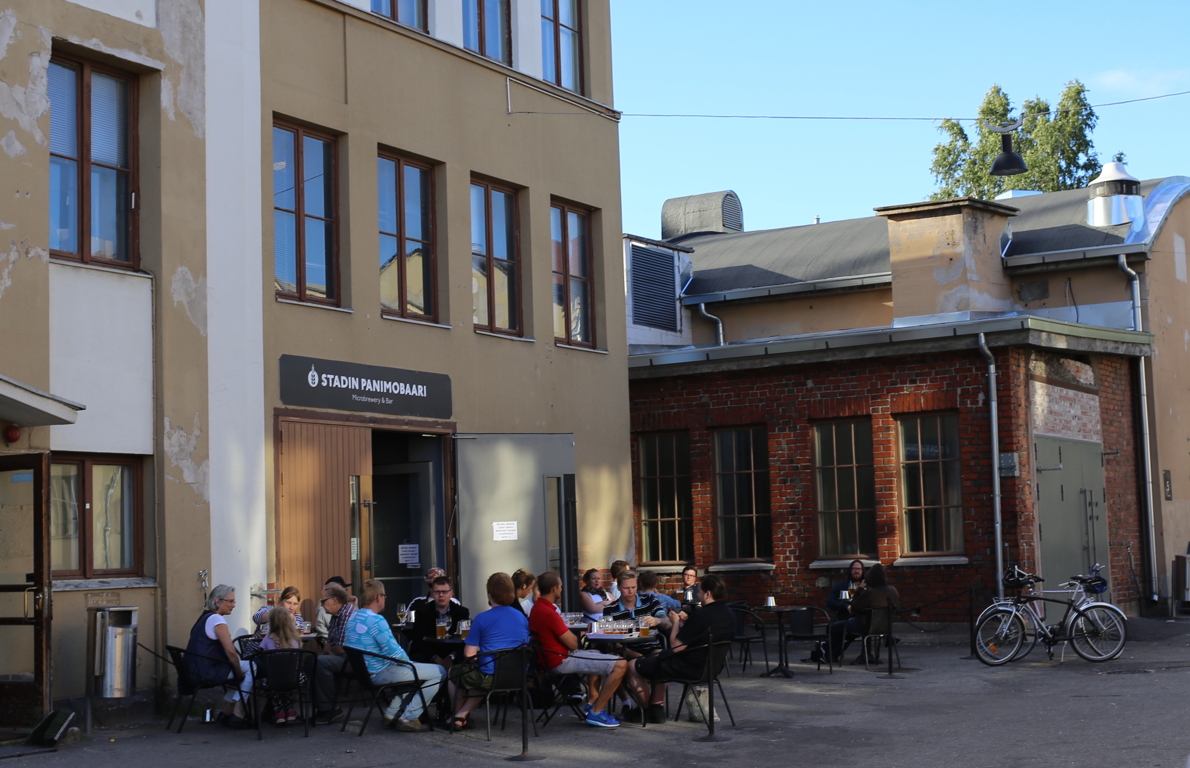 Stadin panimon terassi Suvilahdessa.